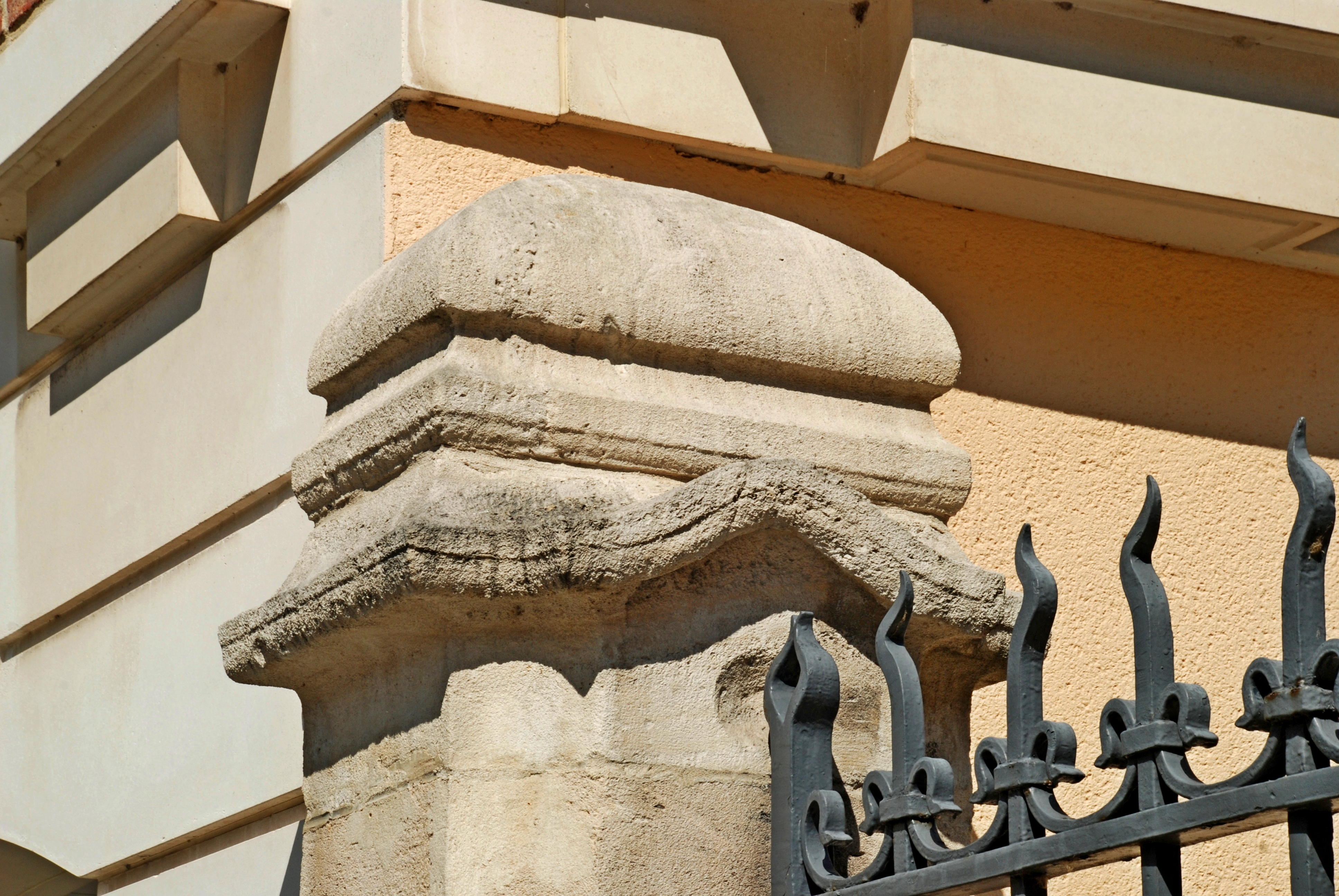 Belgique - Bruxelles - Hôtel De Brouckère